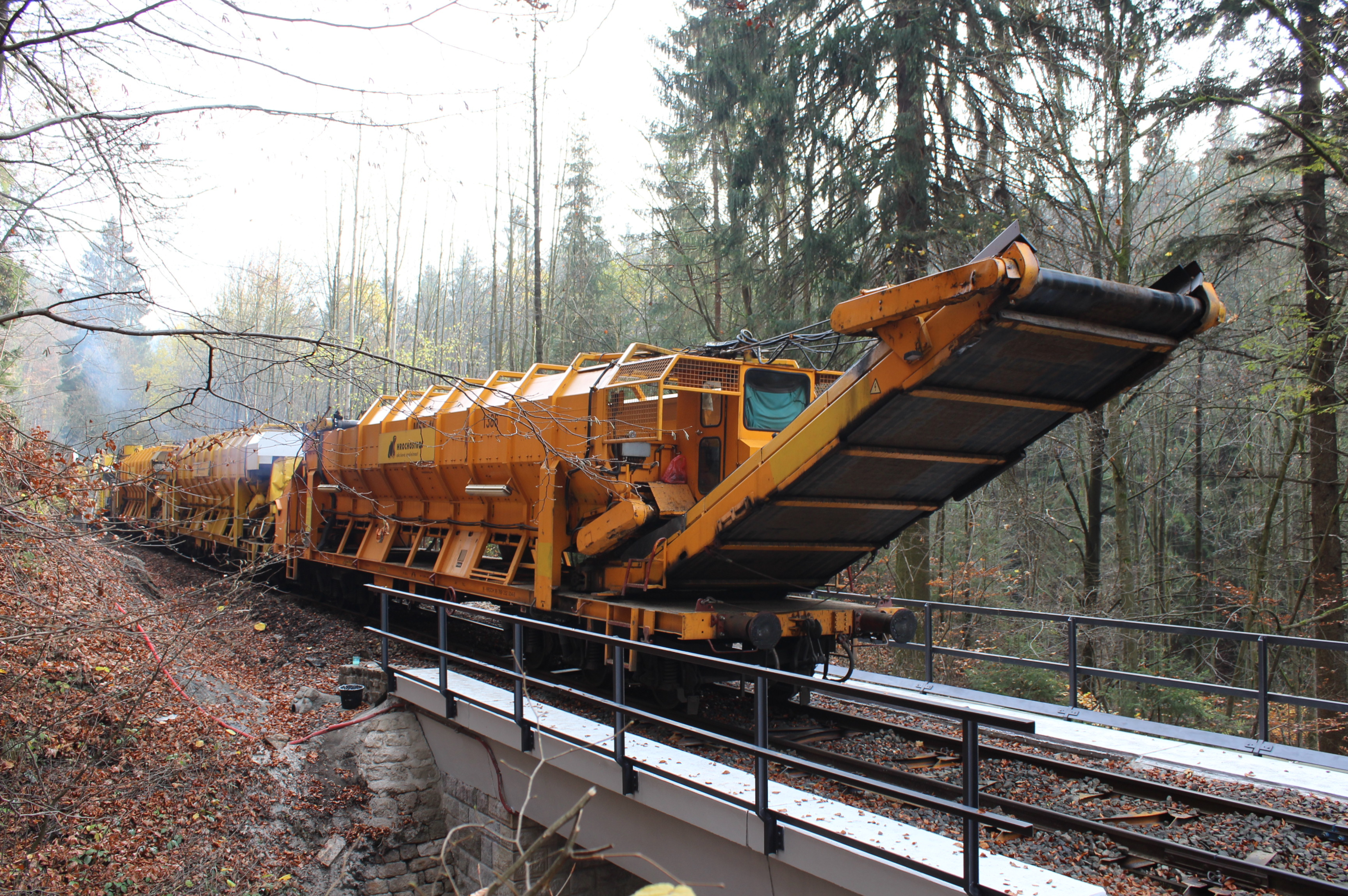 Stavební práce během rekonstrukce tratě v říjnu 2019 u býv. zastávky Držkov